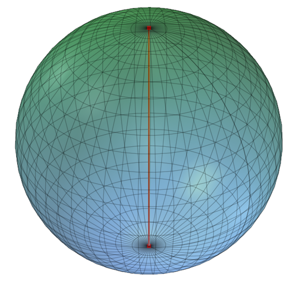 Illustration af antipodale punkter på kuglefladen S²: Nord- og sydpolen.